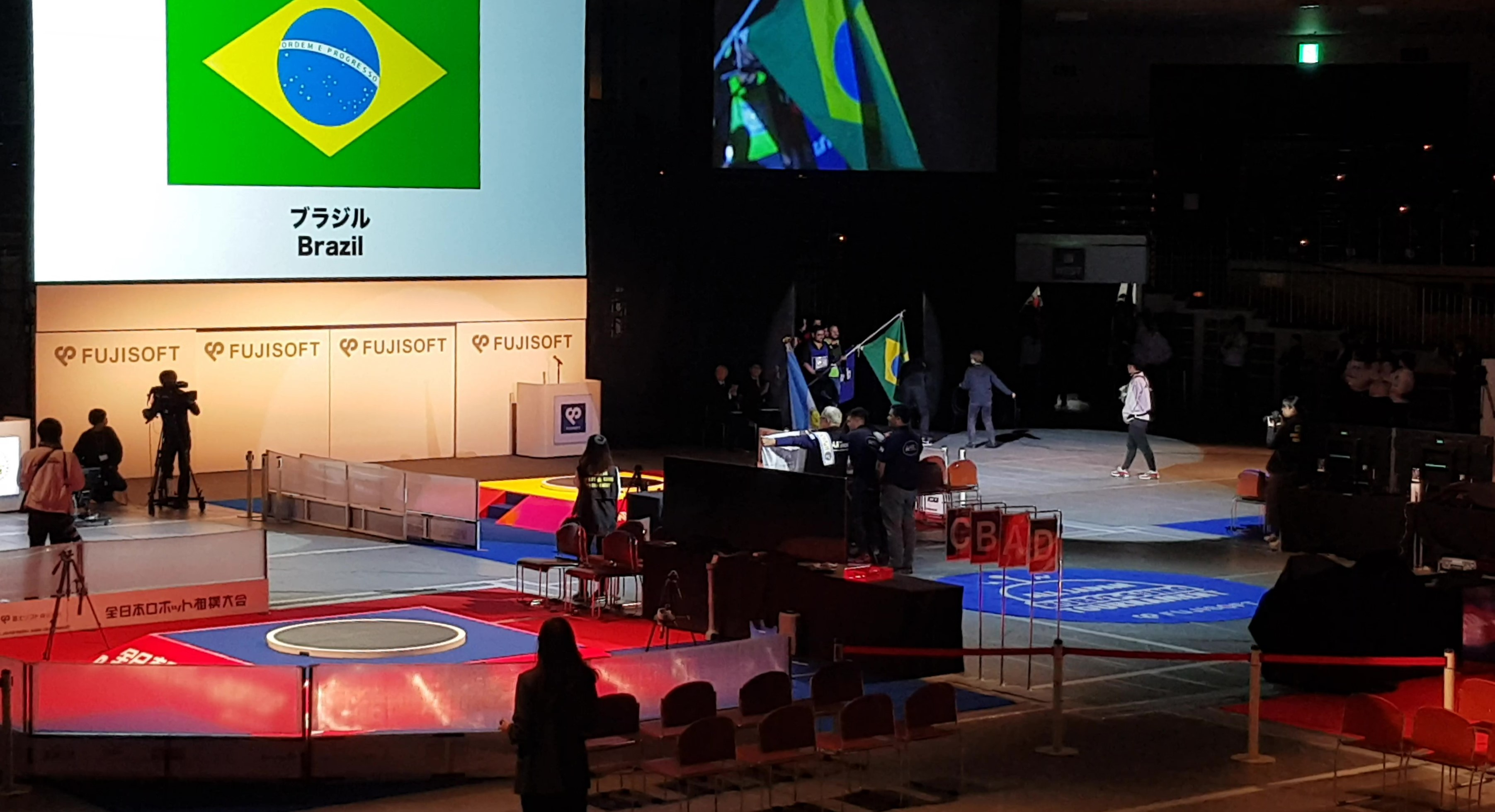 Entrada do Brasil na cerimonia de abertura do All Japan Robot-Sumo Tournament 2019